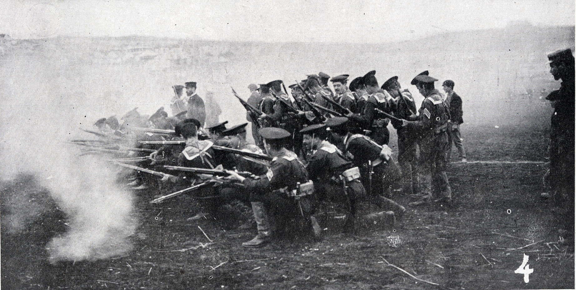 companhia de marinha que iria combater em Angola os Cumatas. Foto tirada na Terra do Desembargador, Belém (Lisboa)